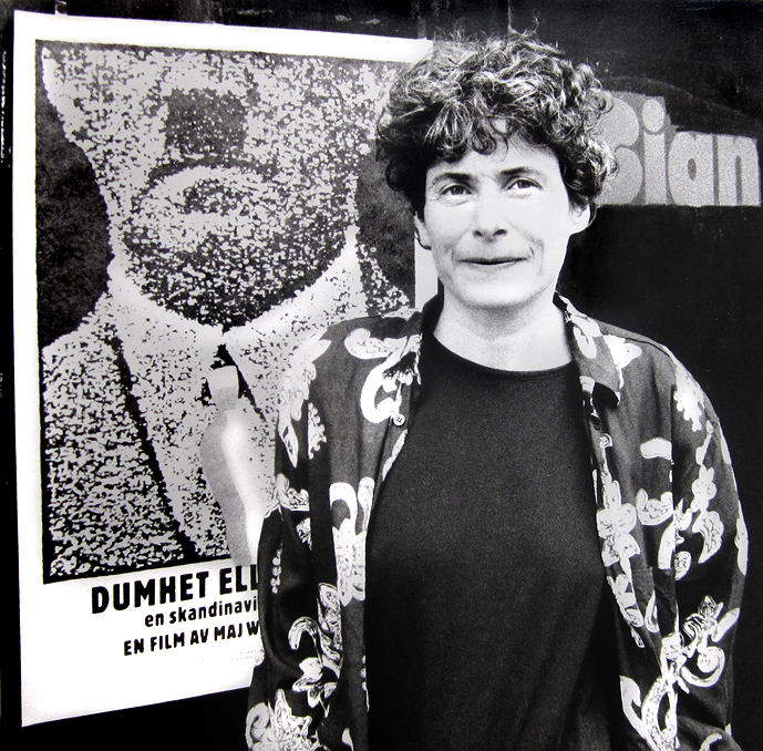 Maj Wechselmann vid Malmö premiären av Dumhet eller brott. 30 mars 1990.